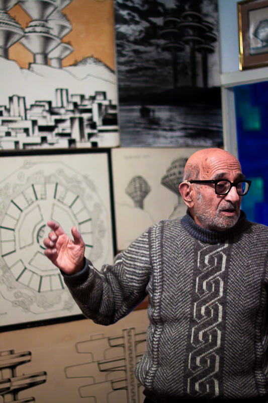 Վան Խաչատուր